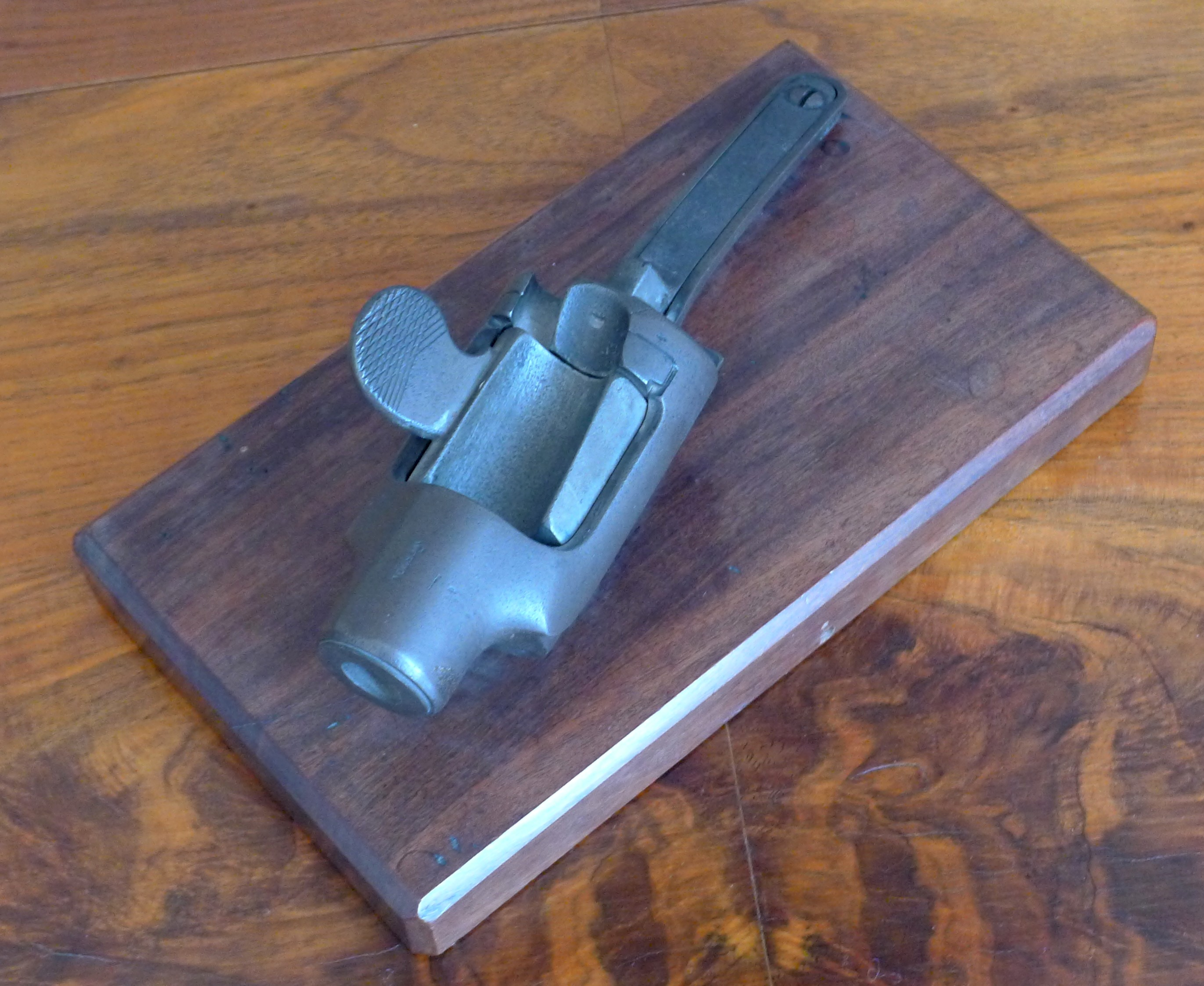 Modell des Tabernakelverschlusses beim Hinterladergewehr (geöffnet)